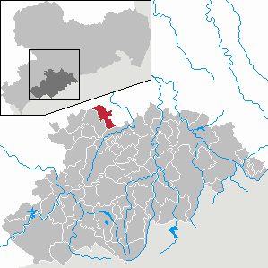 Neukirchen/Erzgeb. im Erzgebirgskreis, Sachsen